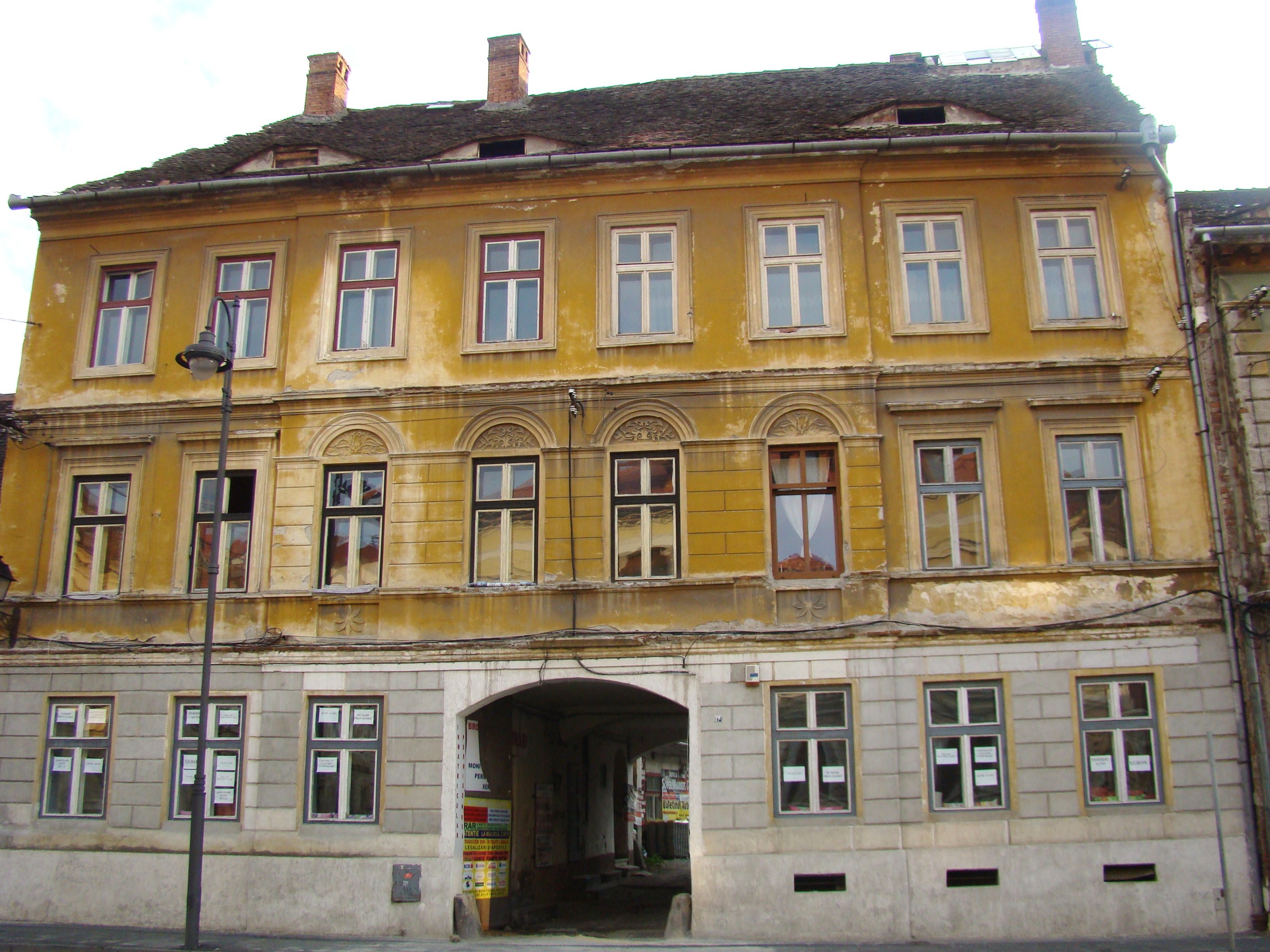 Clădire monument istoric, str.Andrei Șaguna, nr.17